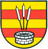 Wappen der Gemeinde Bad Zwischenahn